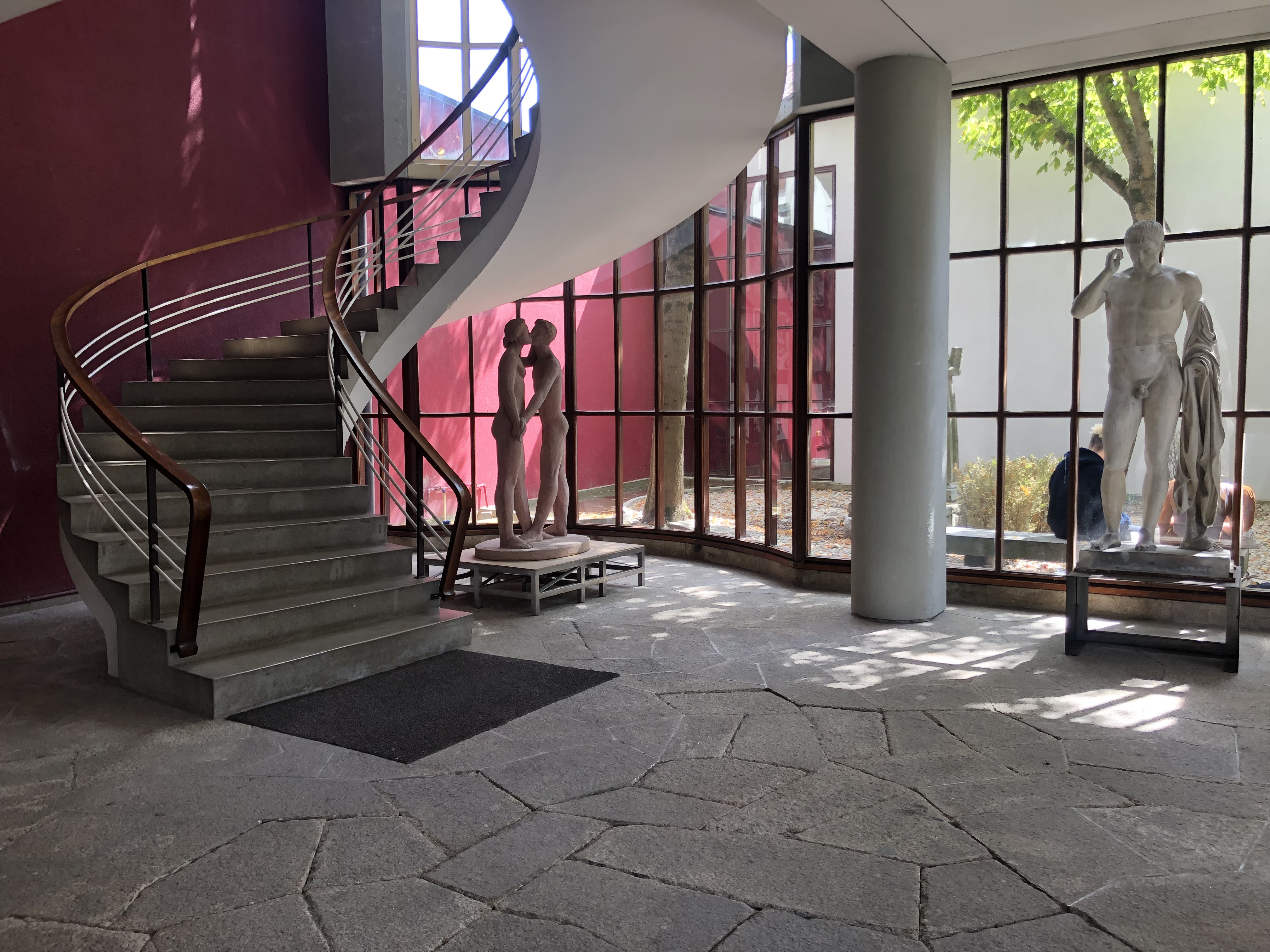 Escola Superior de Belas-Artes do Porto, Hall do Pavilhão Carlos Ramos - edifício em Porto, Portugal Cultural property Escola Superior de Belas-Artes do Porto, Bonfim, Porto, Porto District, Portugal Q66814785, SIPA ID: 5413, DGPC ID: 10830672 Wiki Loves Monuments ID: DGPC-10830672